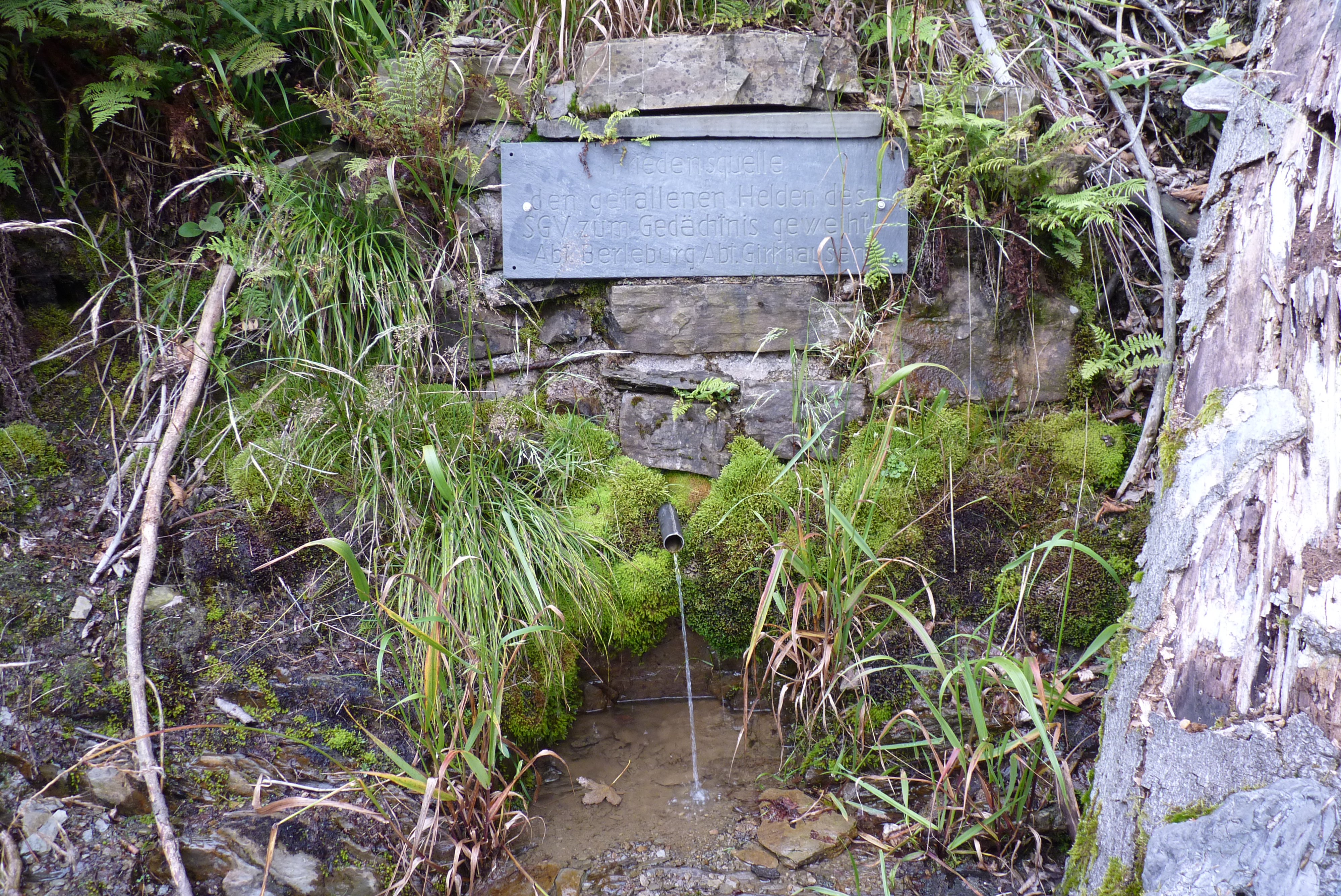 Die Friedensquelle auf 740 m Höhe in der Nähe des Albrechtsplatzes; Naturschutzgebiet „Rothaarkamm am Grenzweg“ in Bad Berleburg